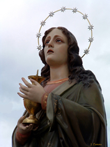 Maria Magdalena de Sorbas, Almería, España